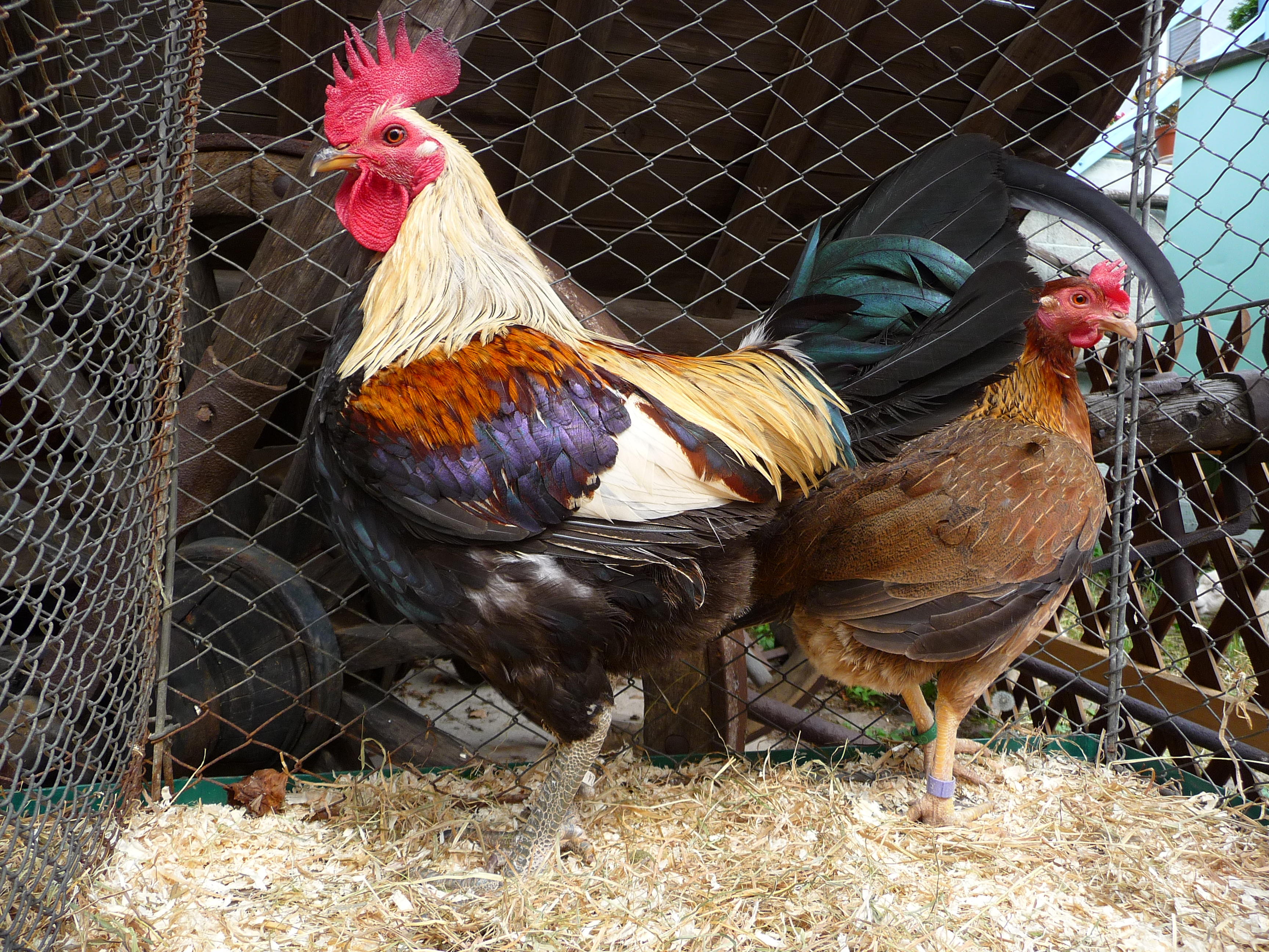 Altenglischer Zwerg-Kämpfer (Old English Game), Hahn und Henne, fotografiert in Baden-Württemberg (Deutschland)